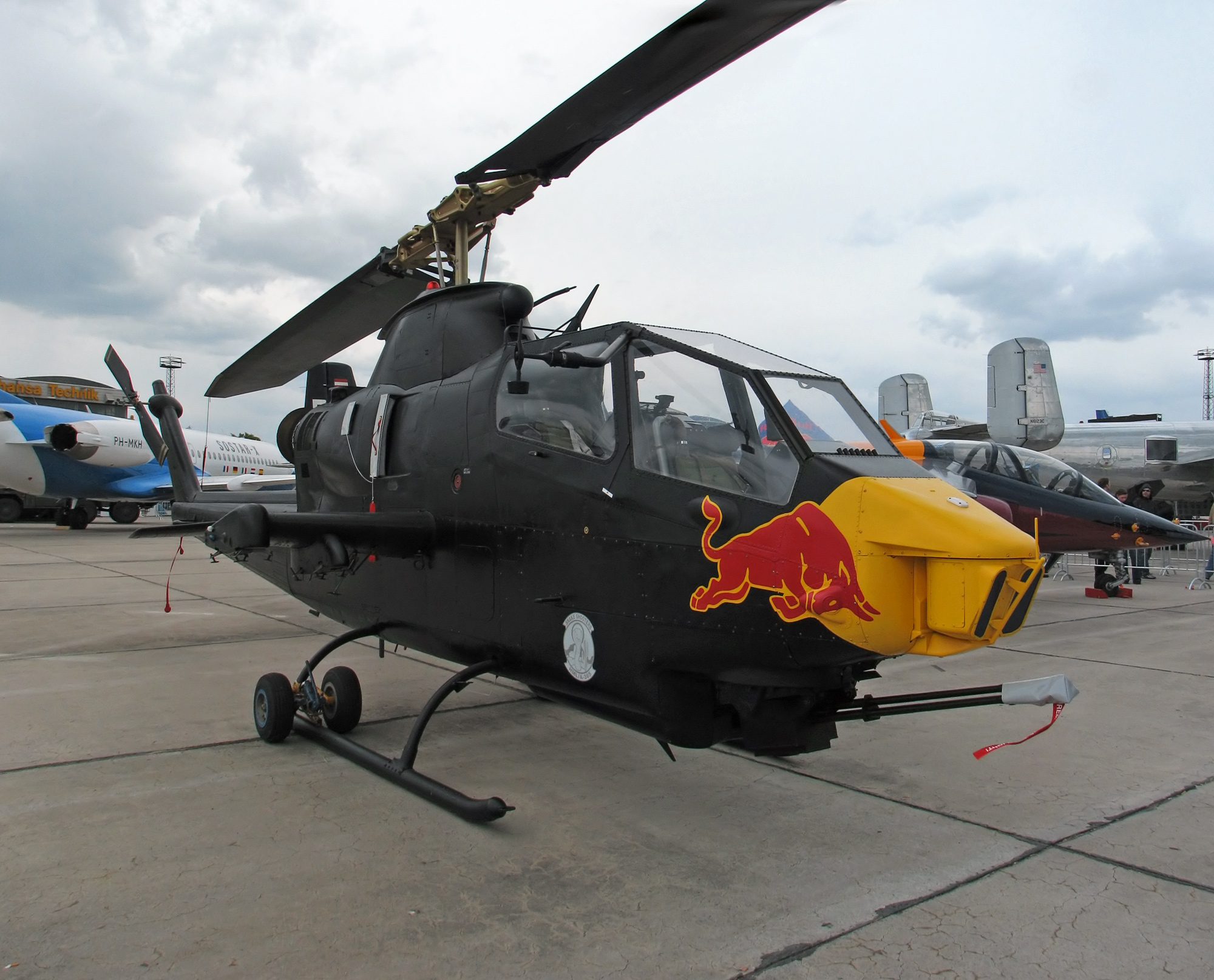 Description/Beschreibung: Bell AH-1 Cobra auf der ILA 2006 in Berlin Author/Fotograf: Darkone, 20. Mai 2006